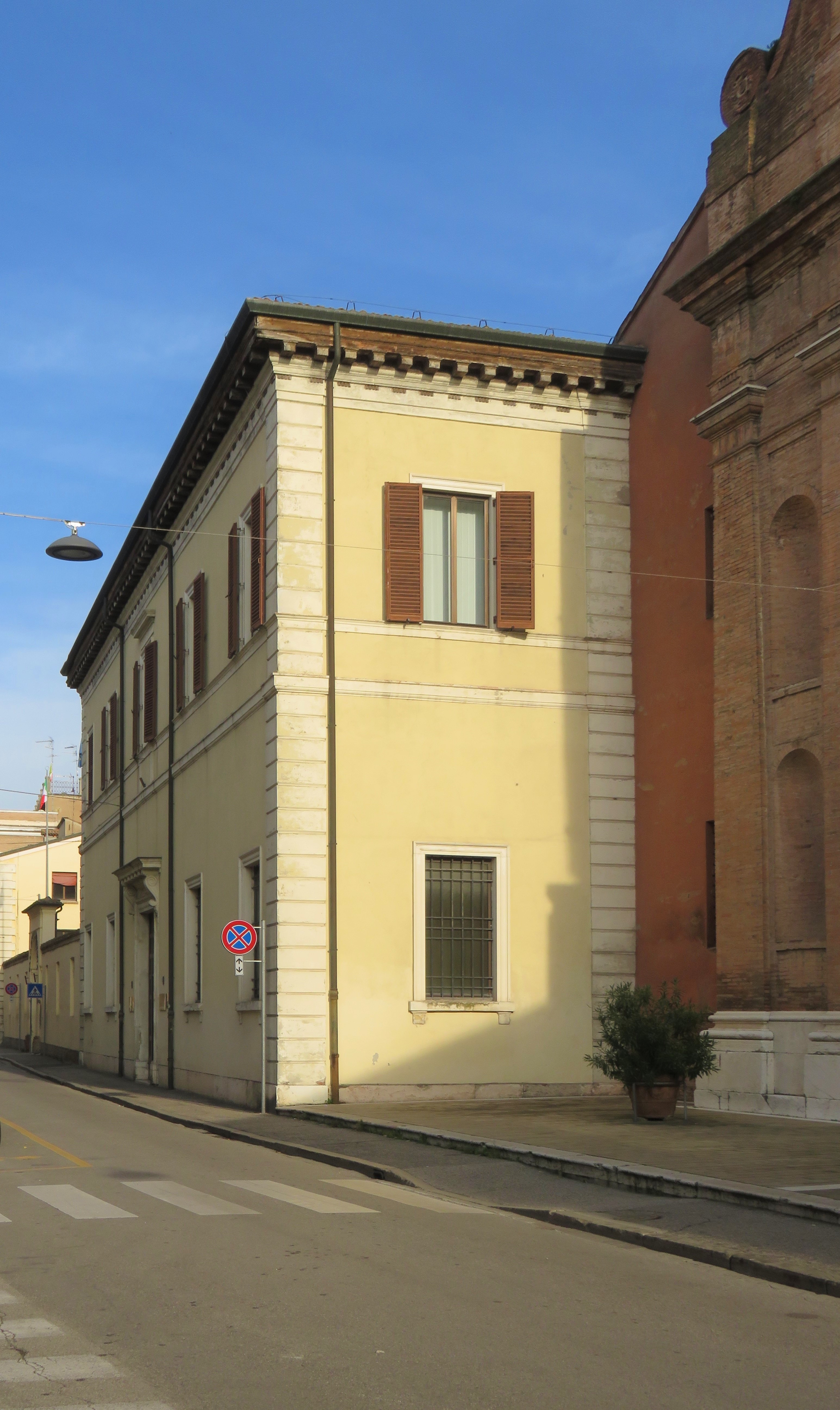 Antica sede del liceo in via Borgoleoni